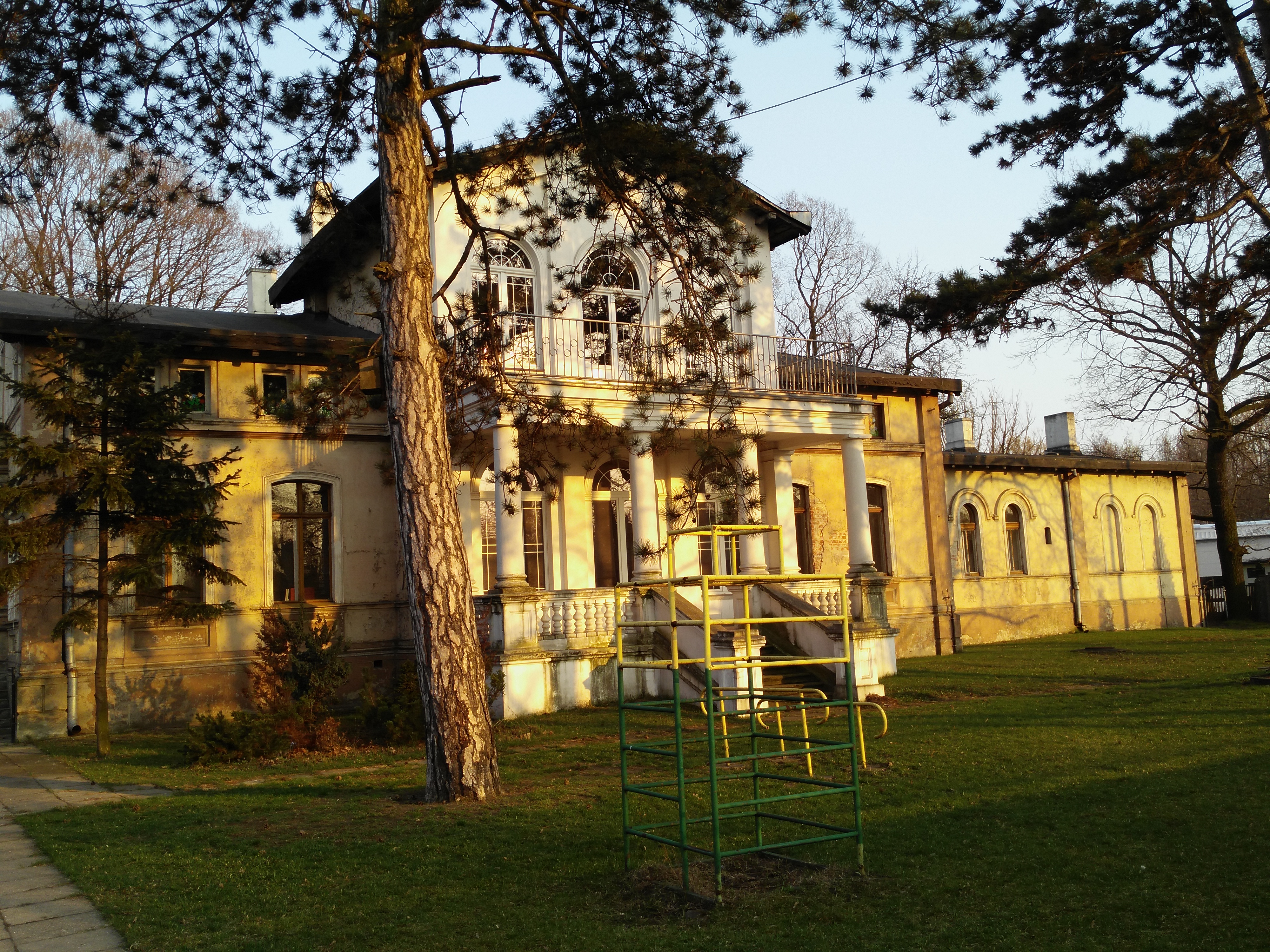 Willa Aleksandra Landsberga przy ulicy Konstytucji 3 Maja w Tomaszowie Mazowieckim, obecnie przedszkole